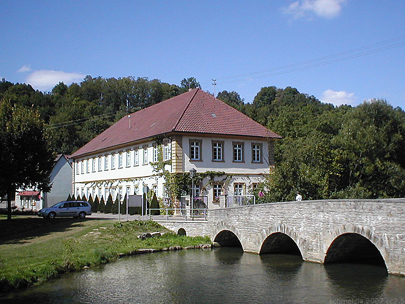 Schloss in Adelsheim-Sennfeld